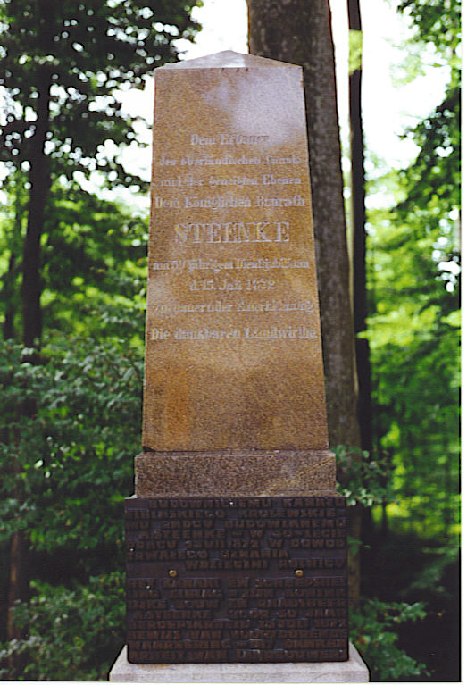 Monument voor ingenieur Steenke op het Elblag - Ostroda kanaal - eigen foto - augustus 1992